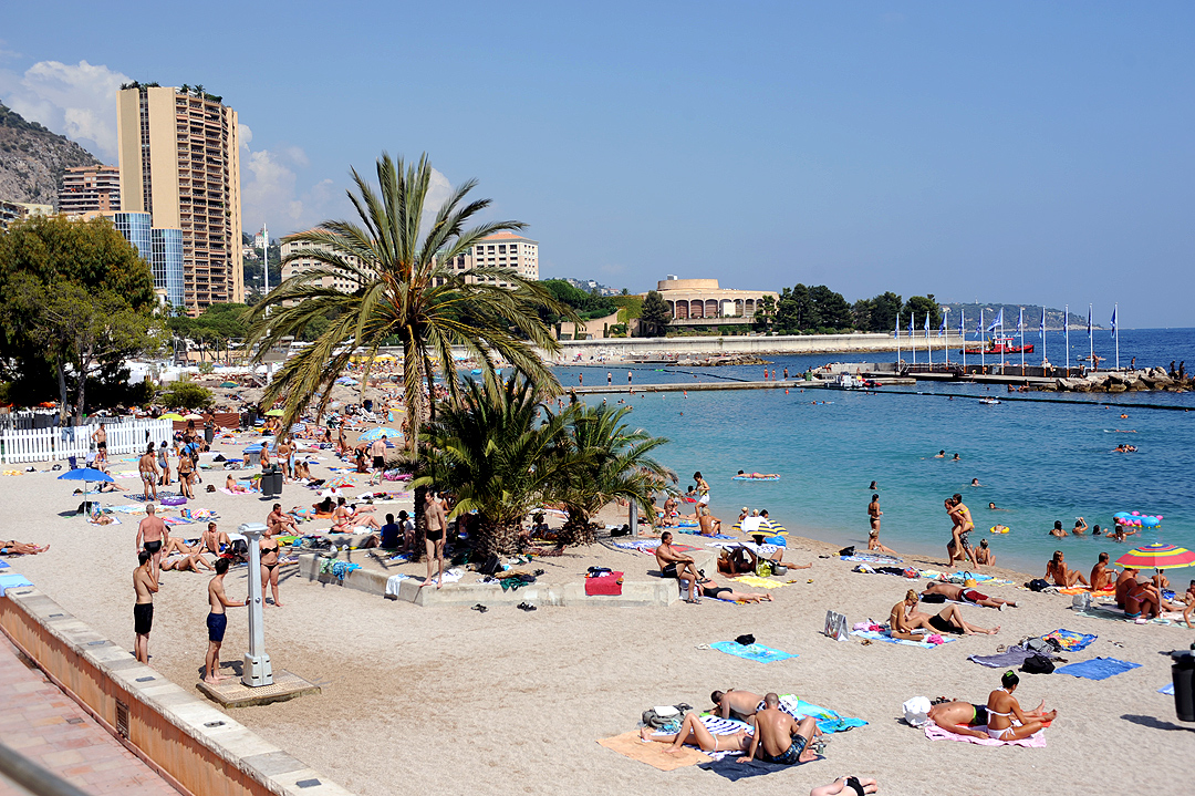 Plage